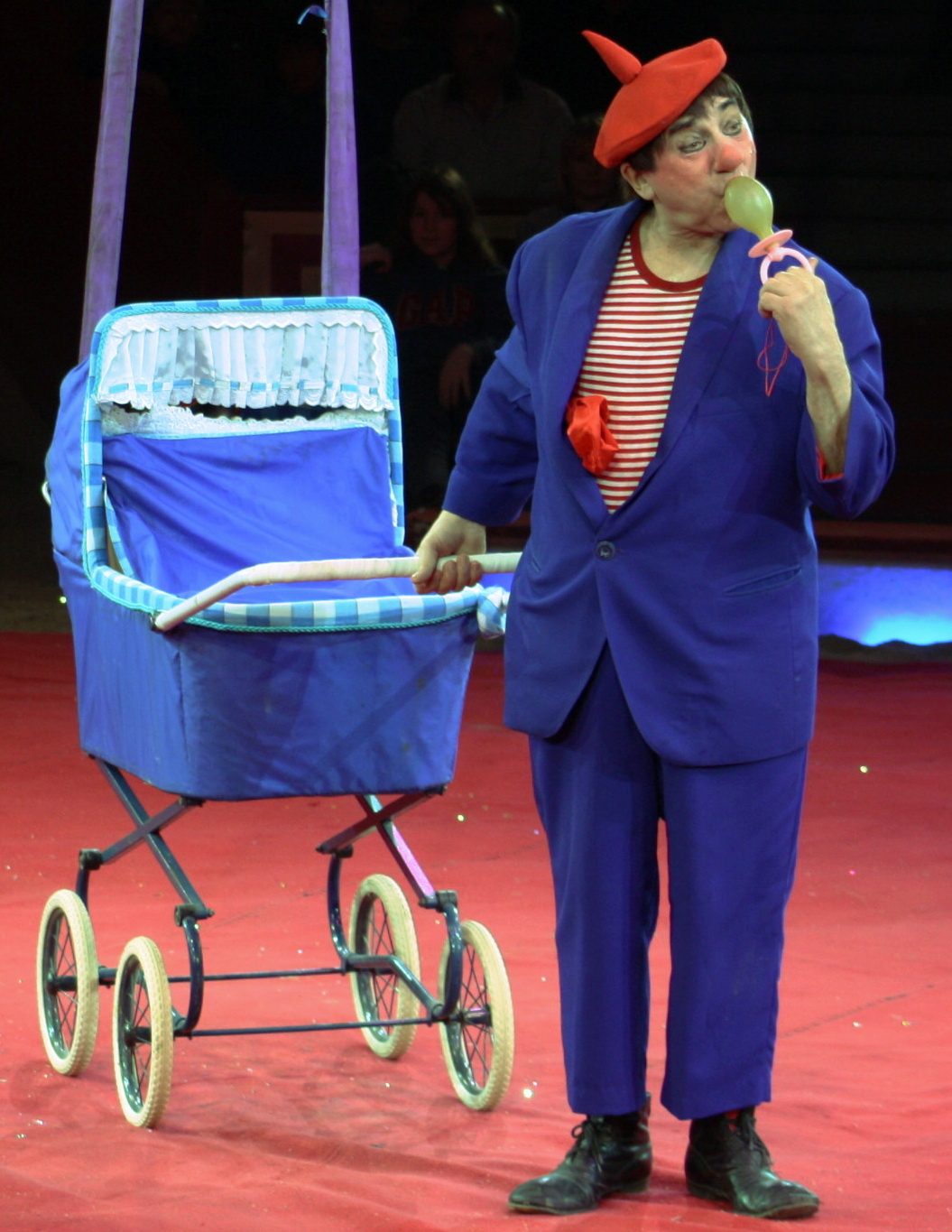 Andrej Nikolajev gehörte zu den Clowns des Moskauer Staatscirkus und ist heute Professor an der Theaterakademie in Moskau.